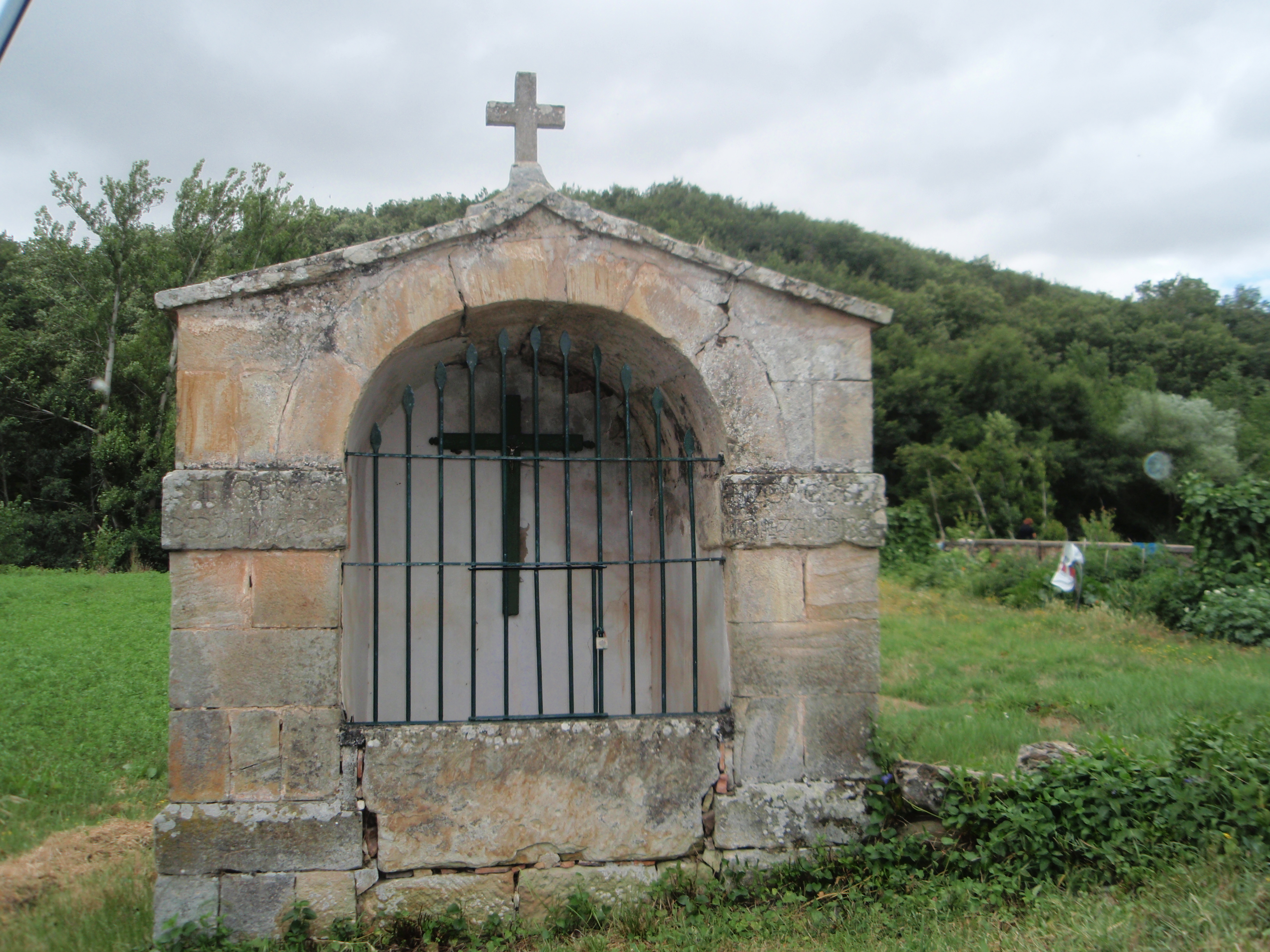 Pequeña ermita en Báscones de Ebro, enclave de Palencia en Cantabria.